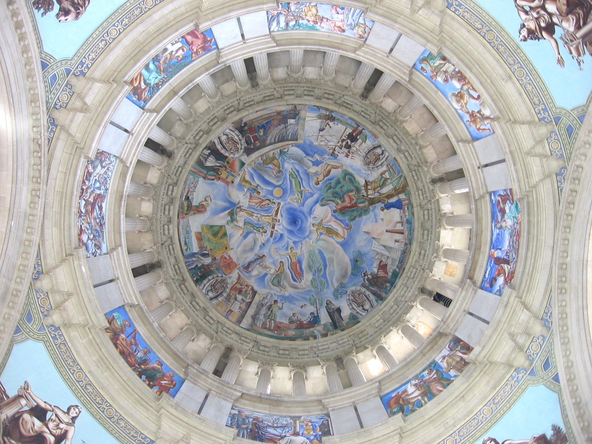 Cúpula del Palau Nacional (Barcelona).